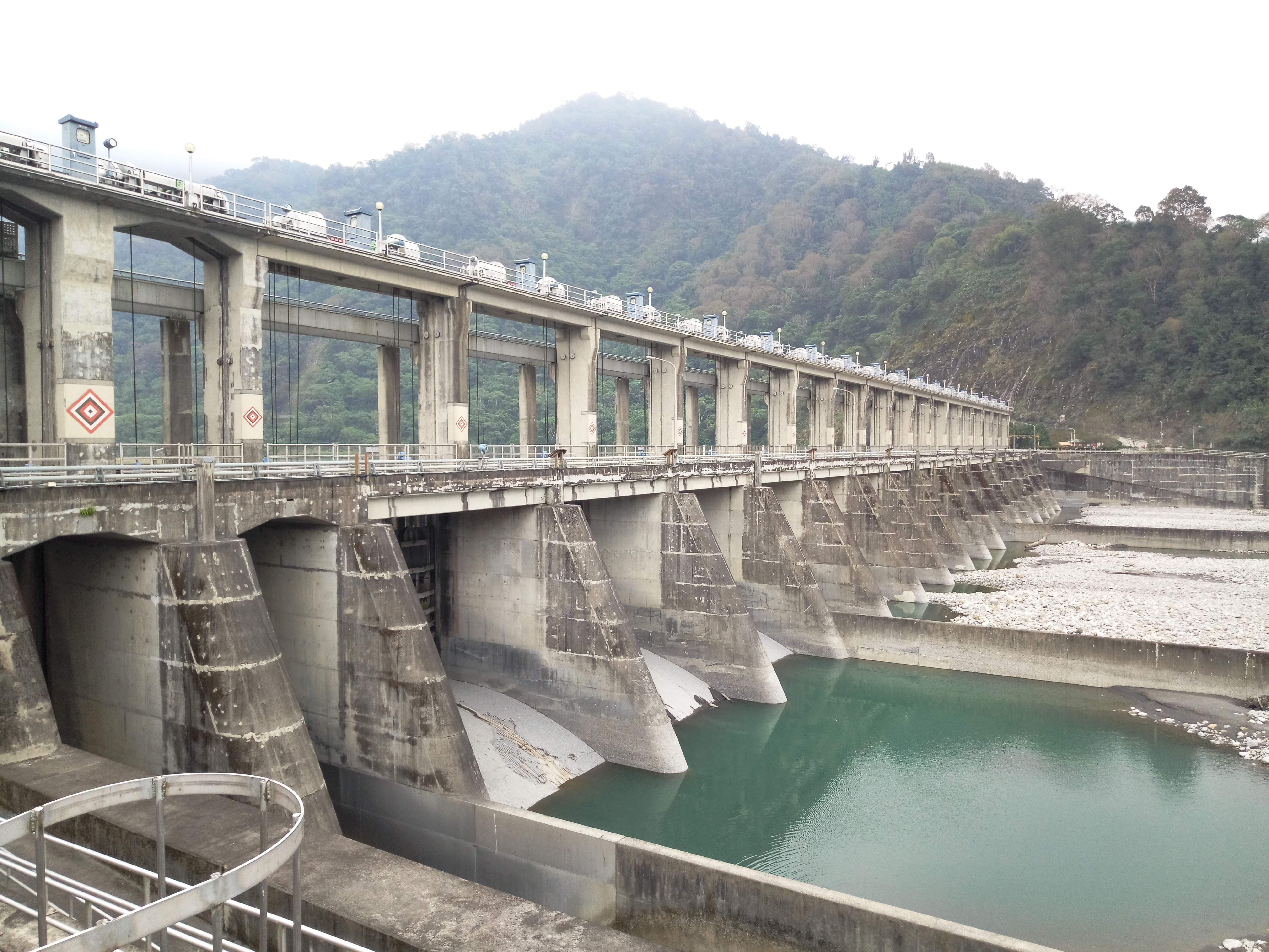 士林攔河堰正面，圖片左邊為兩道排沙門，右邊開始依序皆是排洪道。